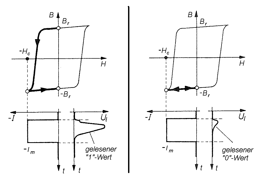 Verhältnisse an der magnetischen Hysteresekurve bei einem Rindgkernspeicher